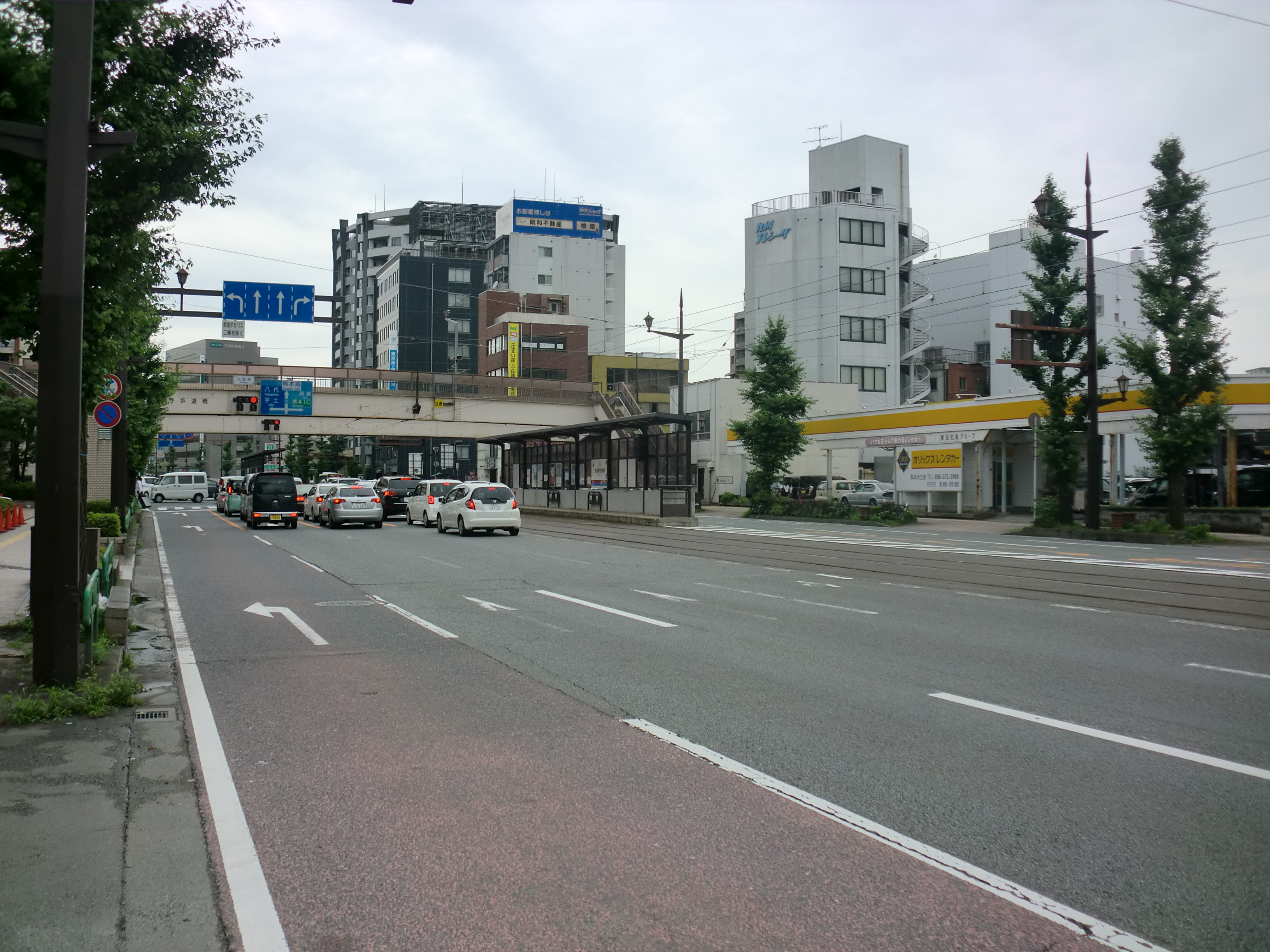 熊本市電九品寺交差点停留場